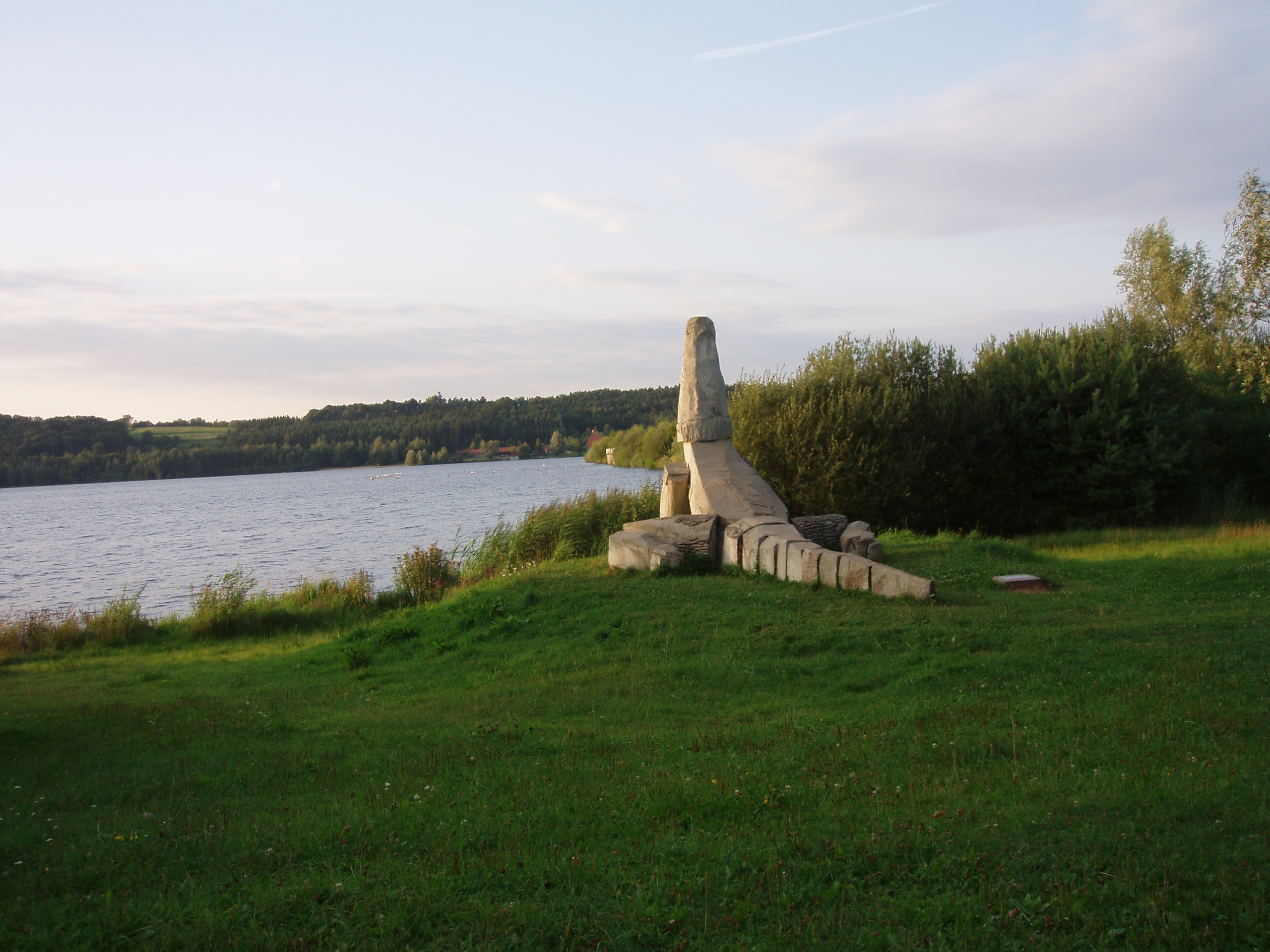 Echse am Brombachsee von Christian Rösner, 1999/2000